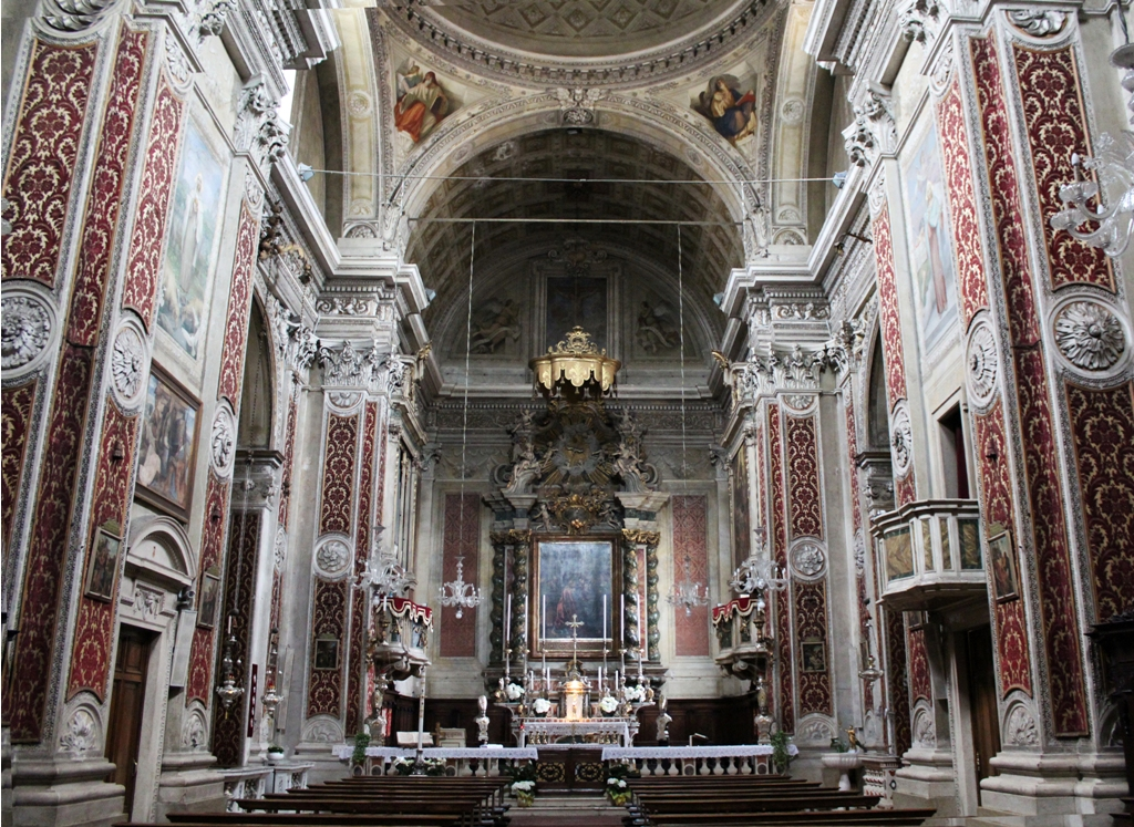 Navata - Chiesa di S. Maria in Calchera - Brescia